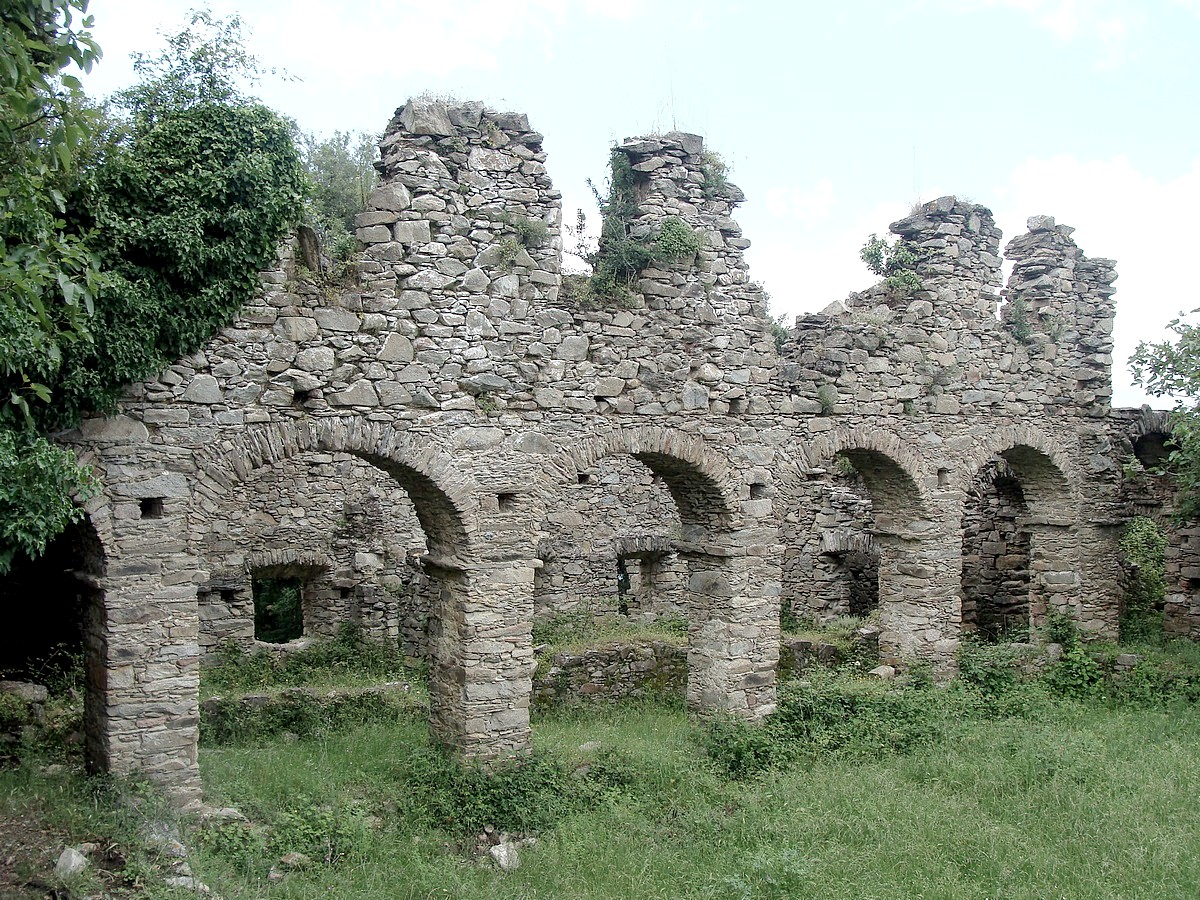 Vue partielle des ruines du couvent Saint-François de Prunelli-di-Fiumorbo (Haute-Corse).